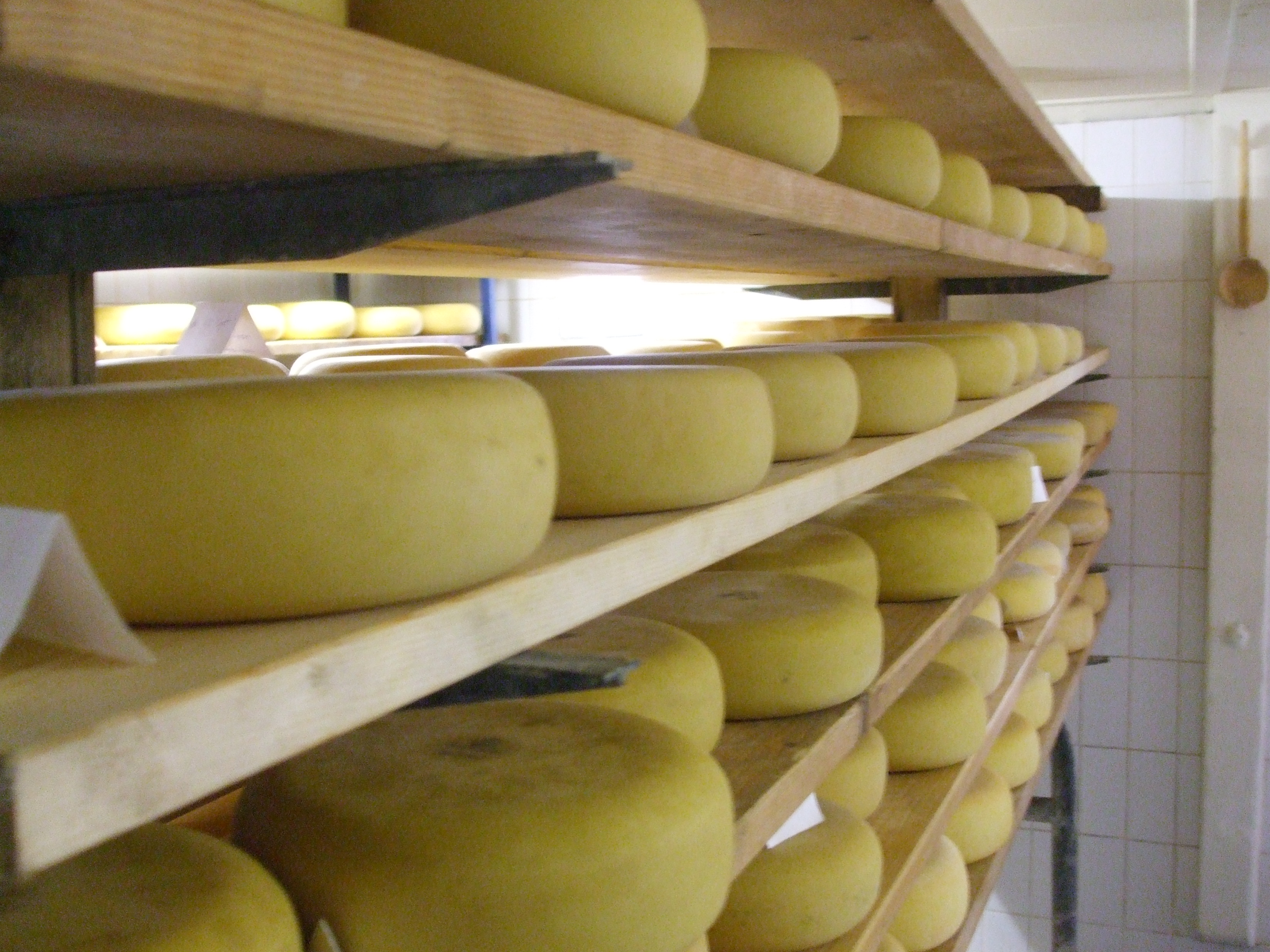 Sheep's milk cheeses